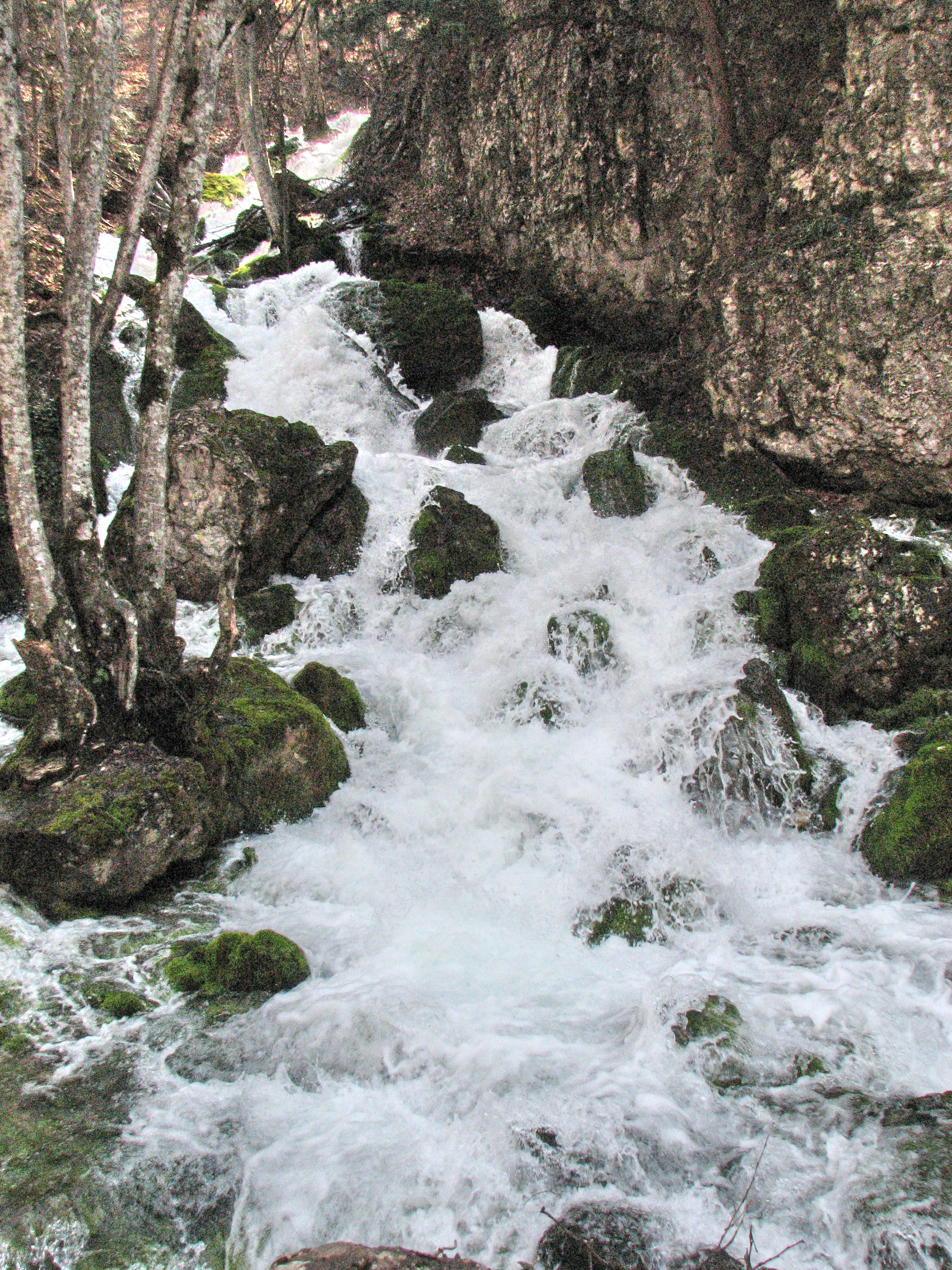 Источник Пания в Большом каньоне Крыма. Второй по мощности источник на полуострове.